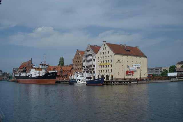 Poland, Gdansk - Olowianka. 27 May 2001